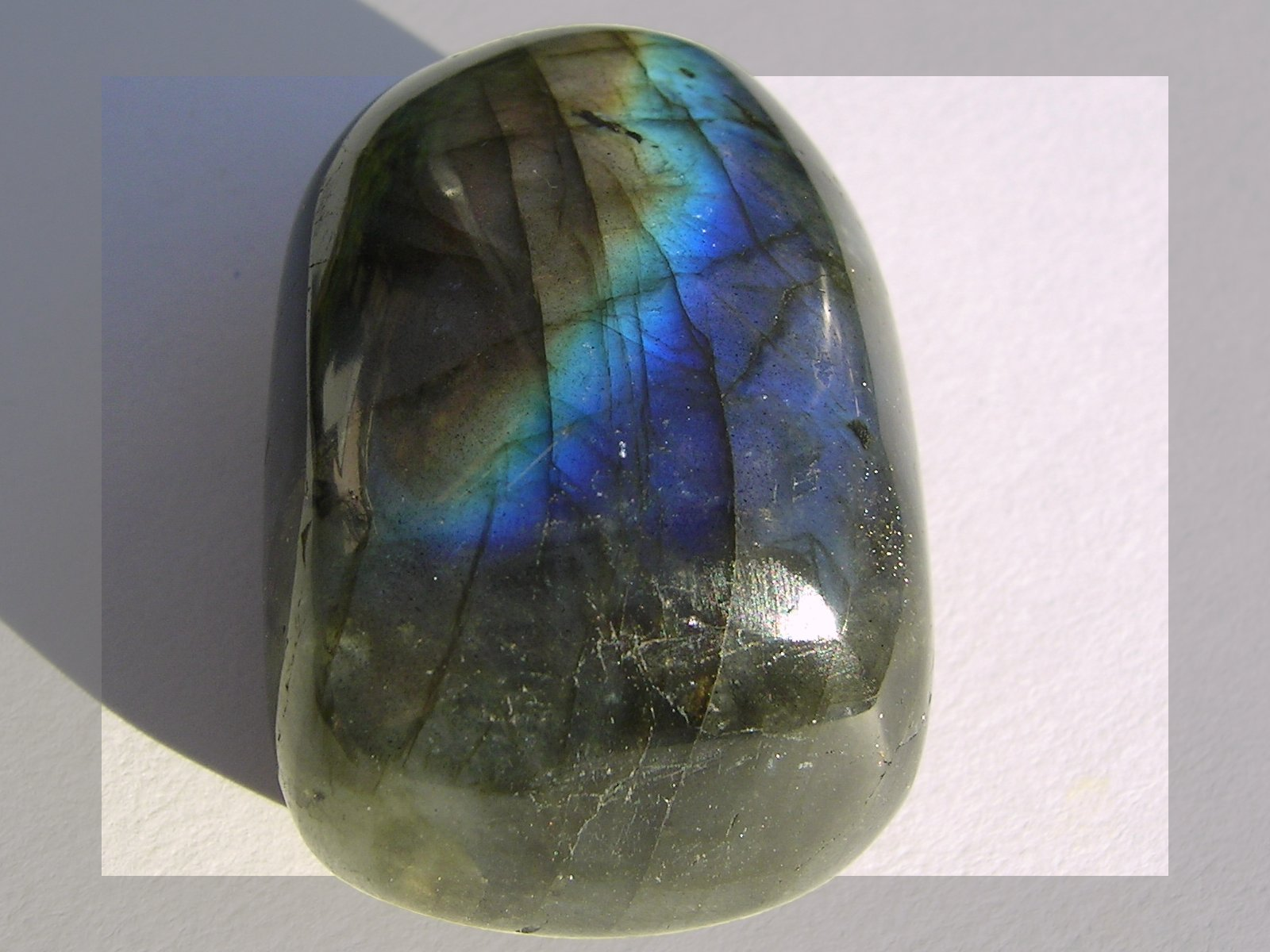 Labradorit, labradorisierend